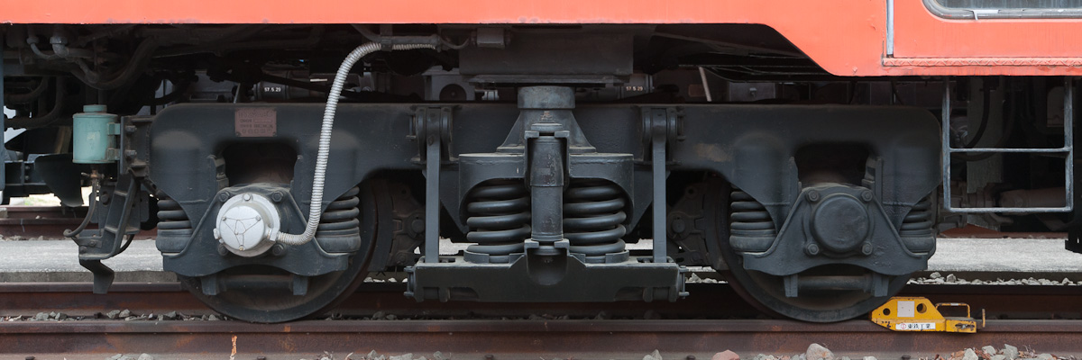 国鉄キハ20形（キハ20 467）気動車のDT22C形台車。碓氷鉄道文化村の保存車。